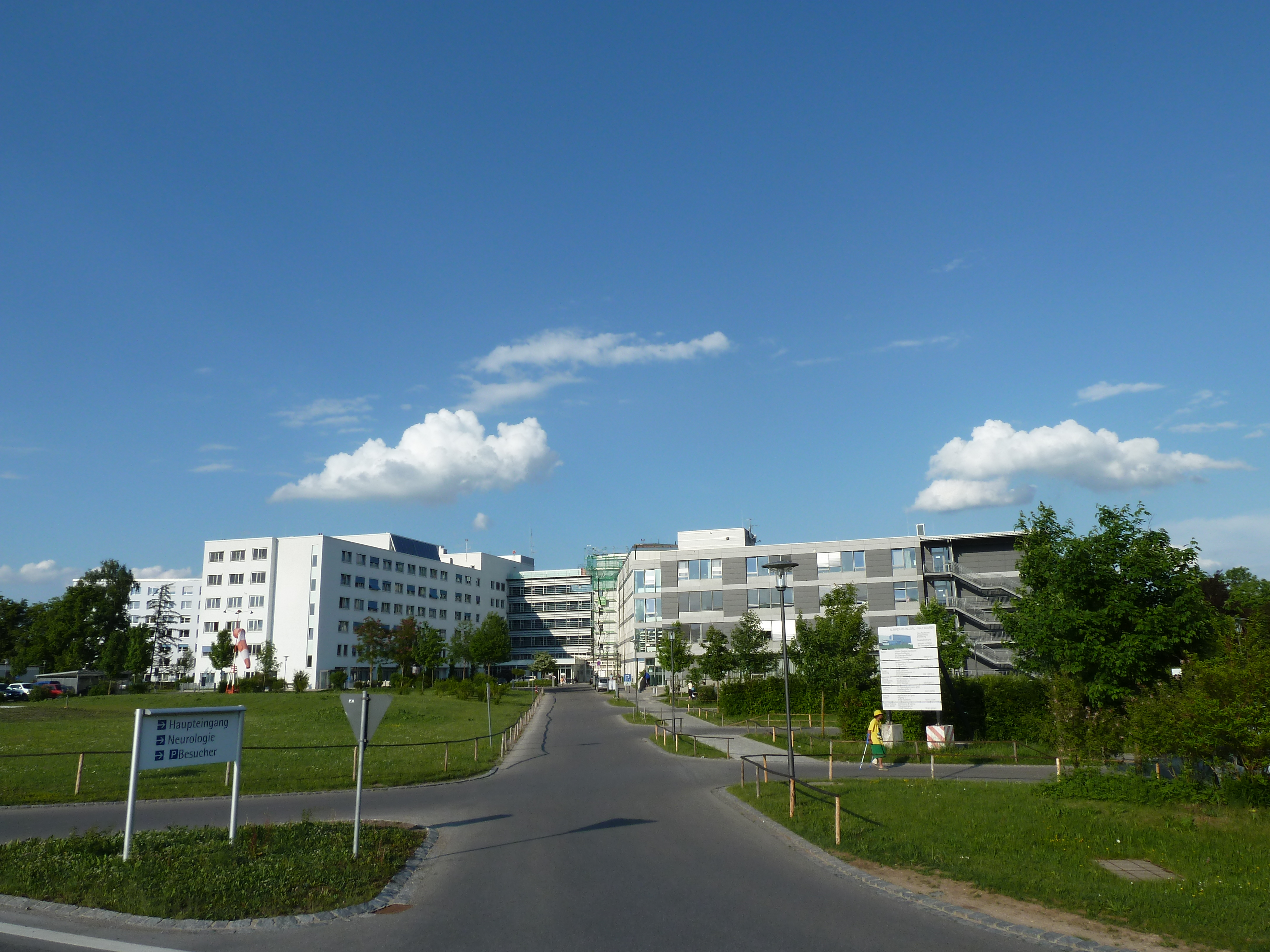 Kaufbeuren Klinikum